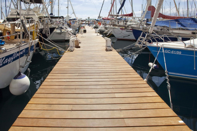 Uno de los pantalanes del puperto de mogán